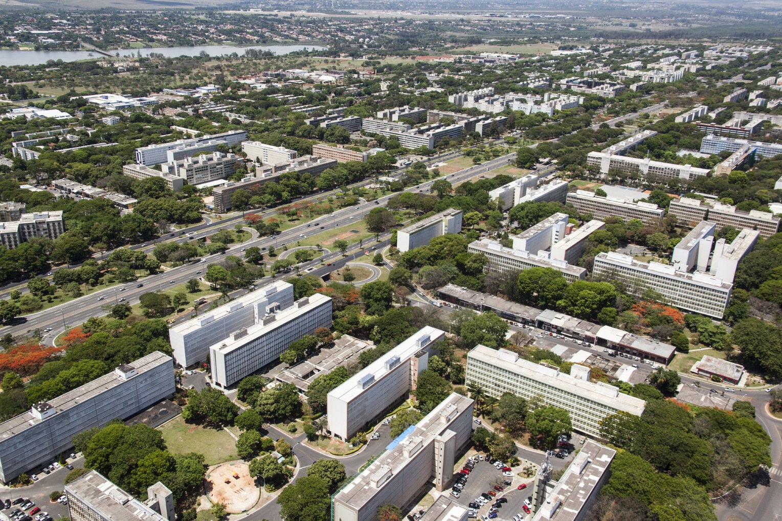 Vista aérea da Asa Sul em direção ao Lago Sul, em Brasília, Brasil.